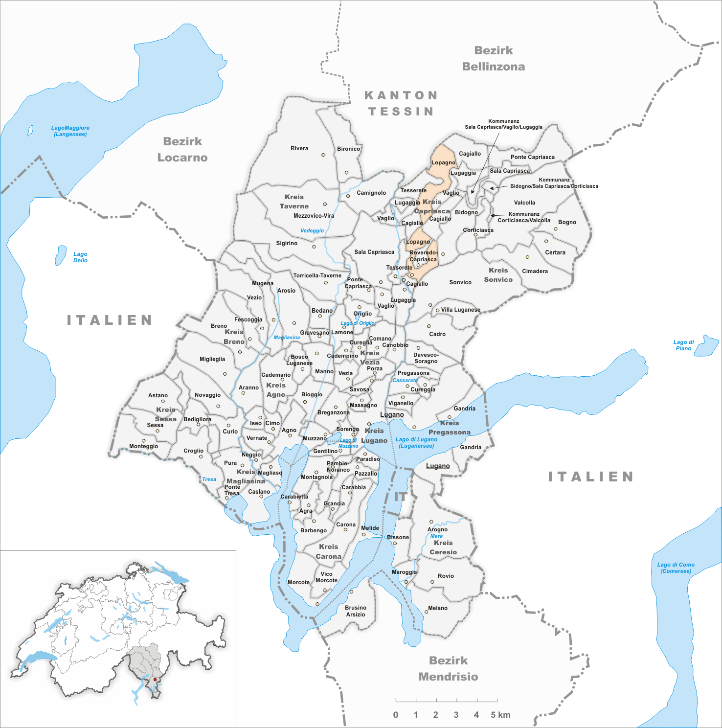 Municipality Lopagno Artist: Tschubby